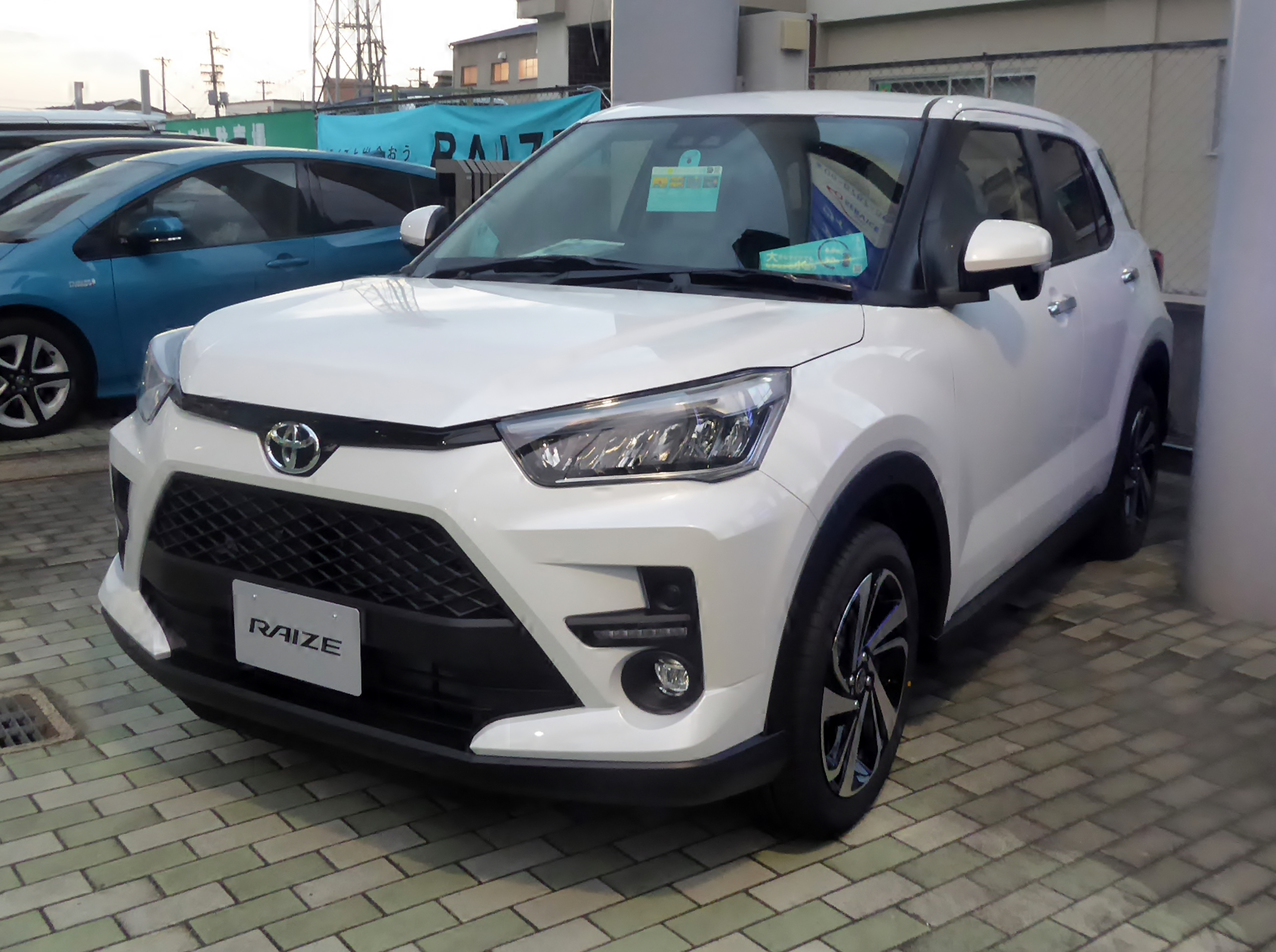 5BA-A200A-GBSV型トヨタ・ライズZ 2WDをフロントから撮影。